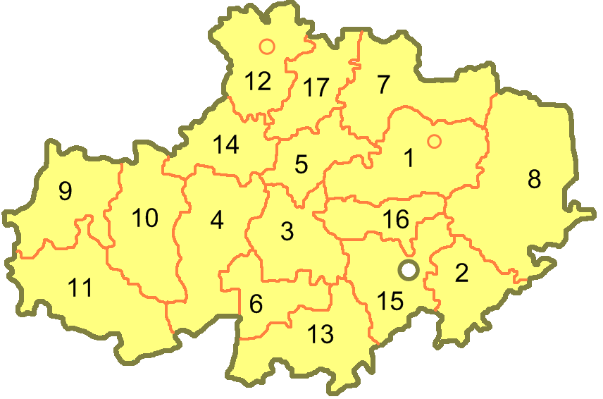 Схема Акмолинской области Казахстана. Пронумеровано в алфавитном порядке